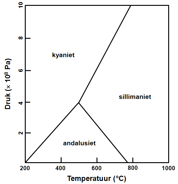 Fasendiagram van aluminosilicaat (Al2SiO5) mineralen